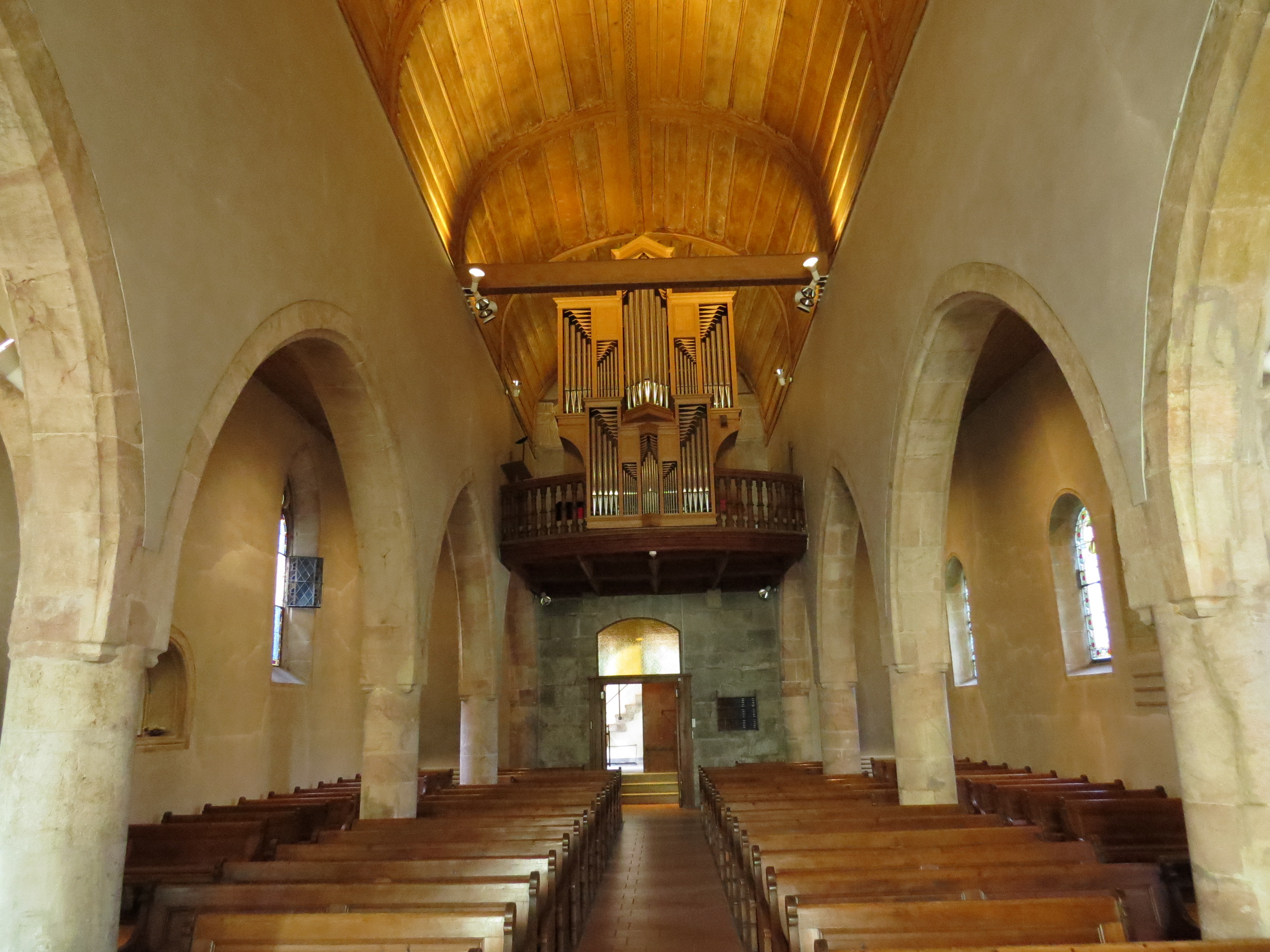 Vue d'est en ouest